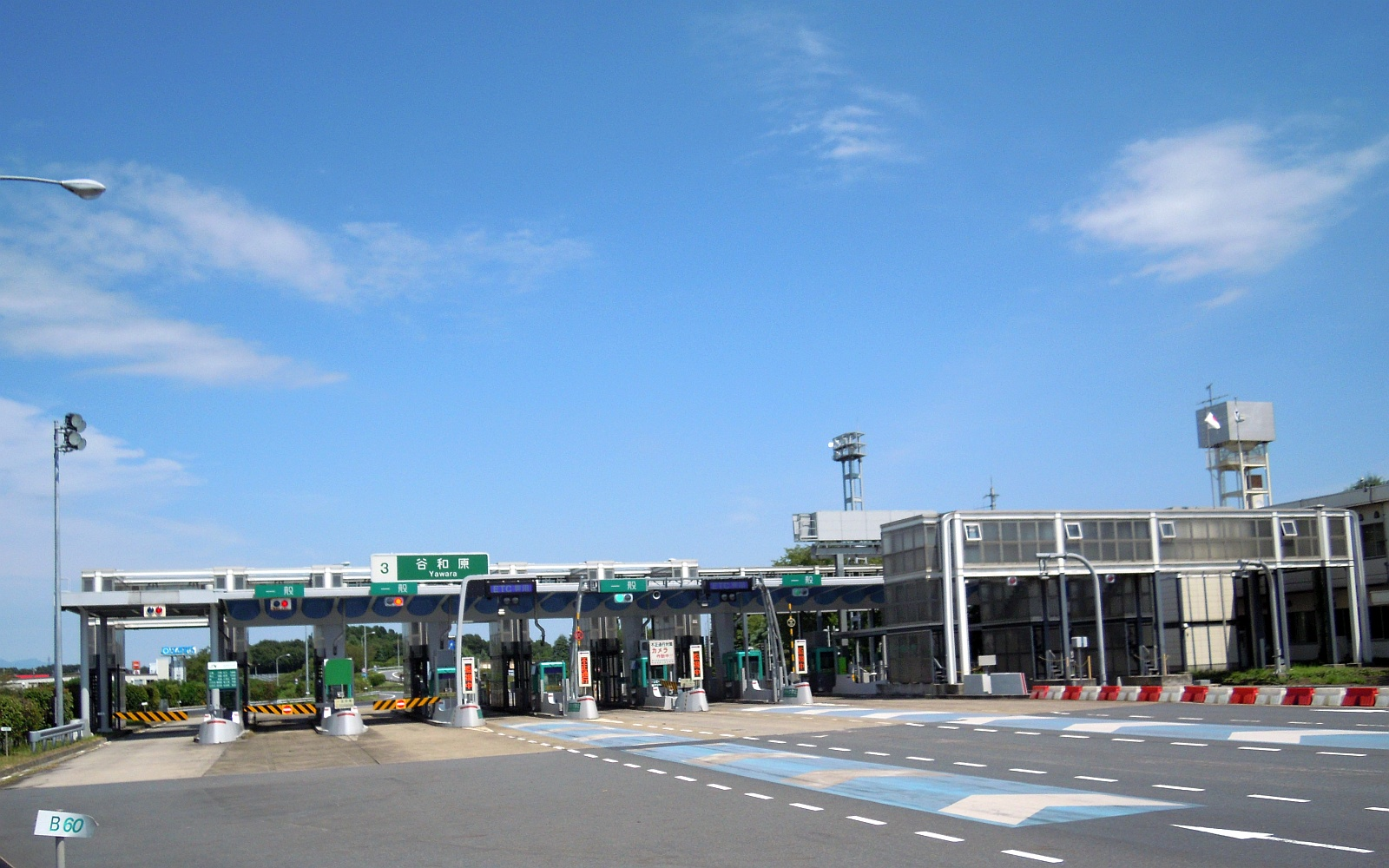 茨城県つくばみらい市にある常磐自動車道谷和原インターチェンジ料金所を本線側から。